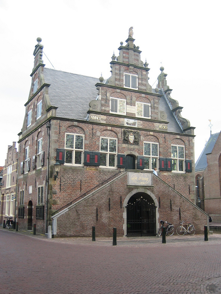 De Rijp Raadhuis 17090